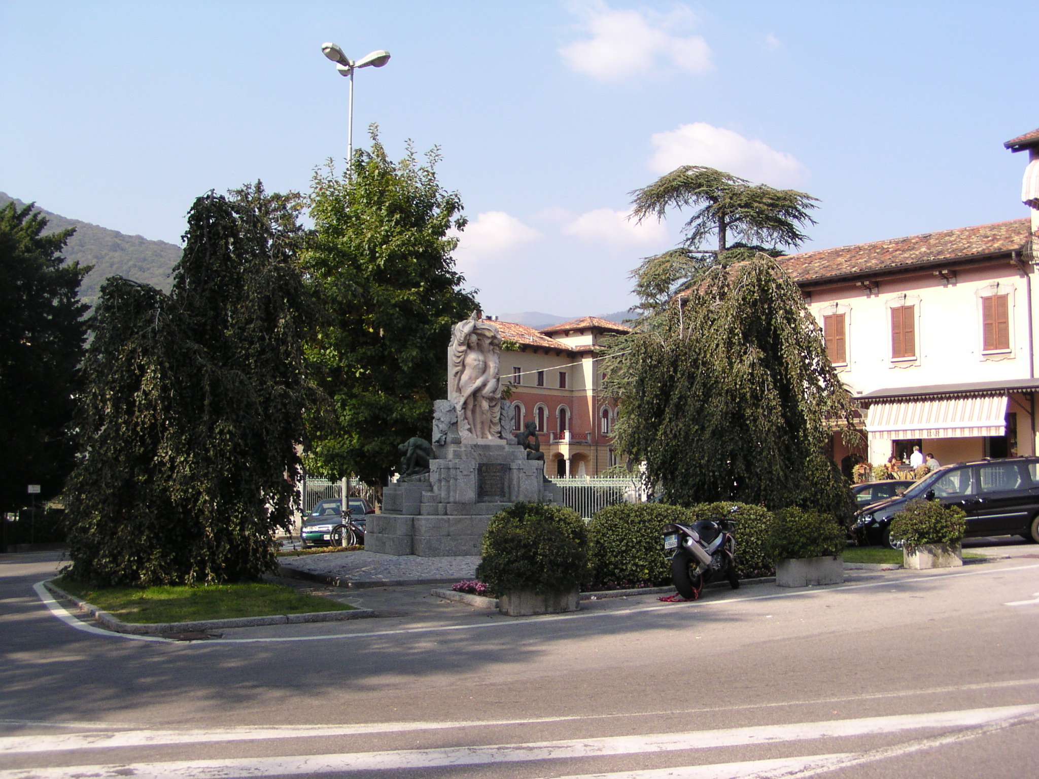 Monumento ai caduti presso Canzo